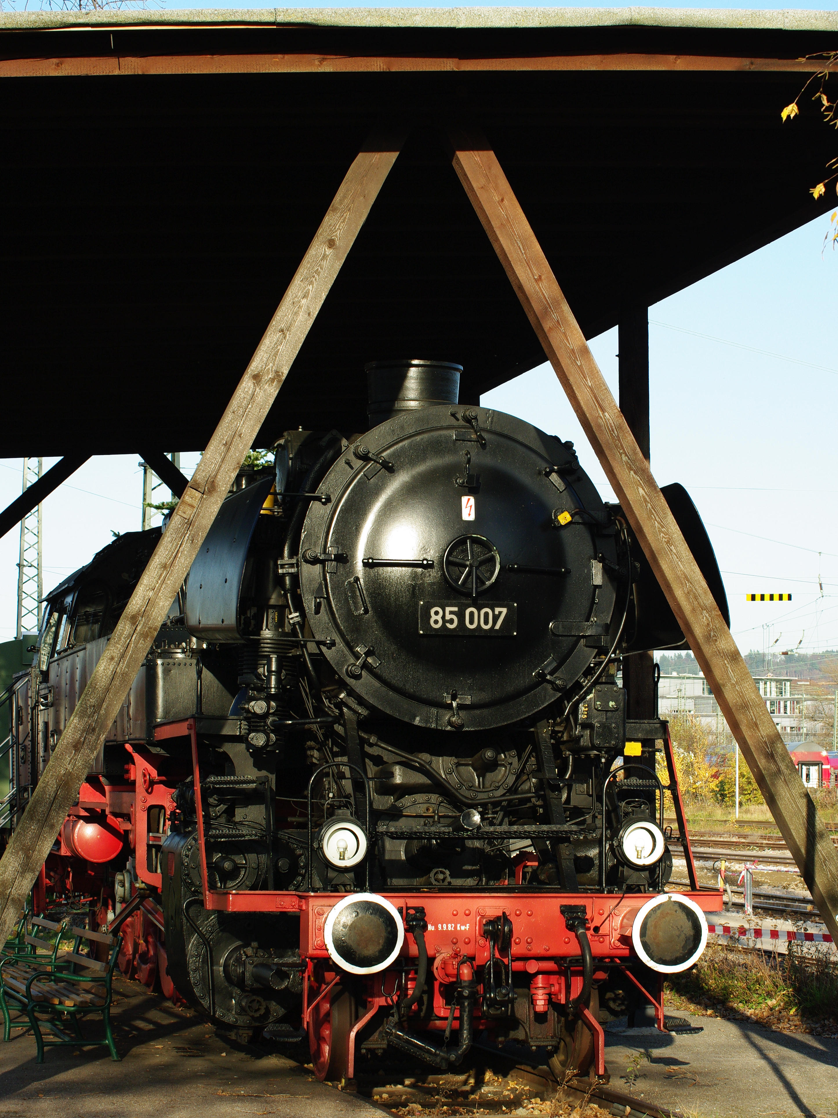 Bilder der Lokomotive 007 Baureihe 85 die im Besitz der Stadt Freiburg und auf der Höllentalbahn gefahren ist